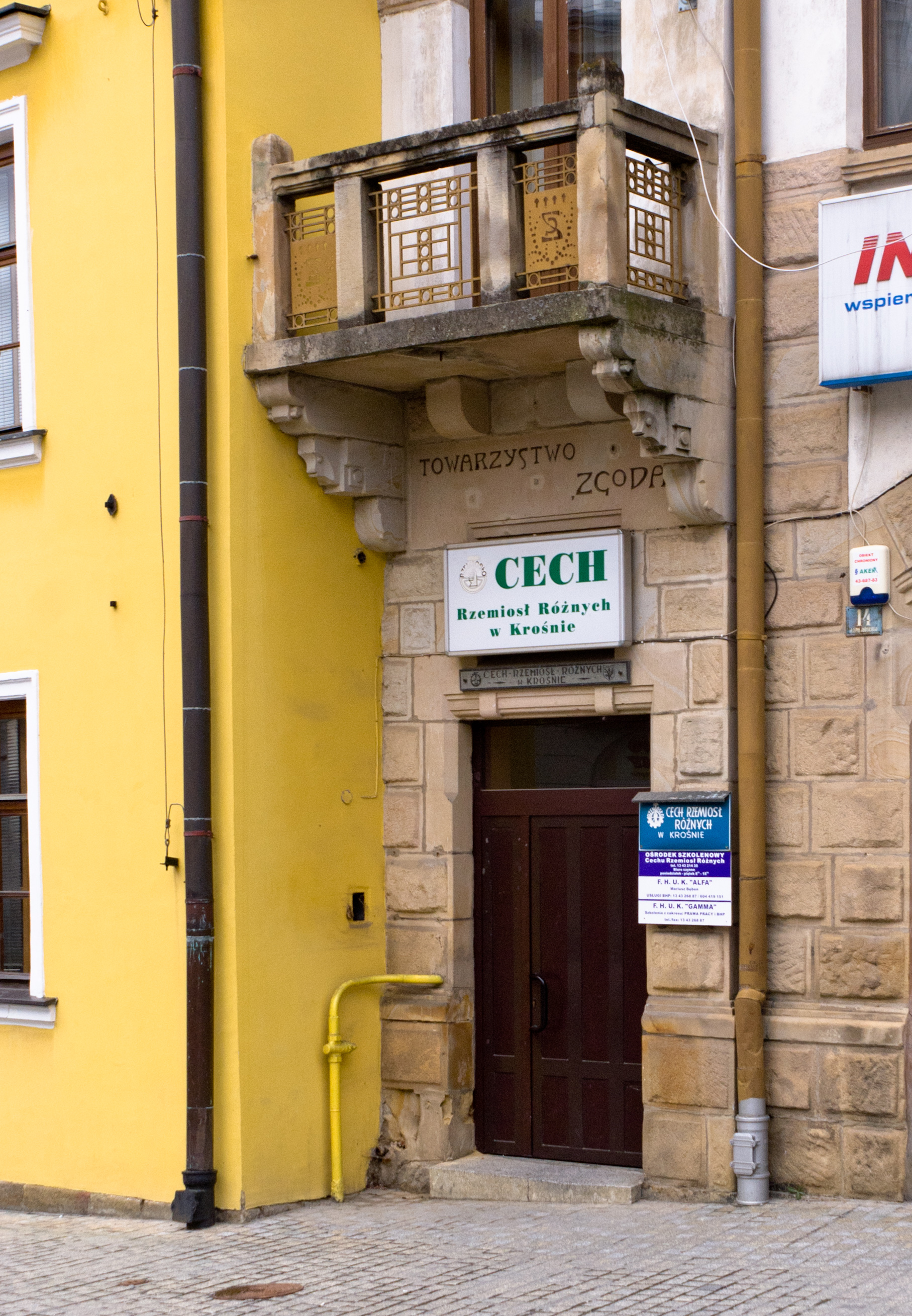 Budynek Cechu Rzemiosł Różnych w Krośnie, ul. Józefa Piłsudskiego.